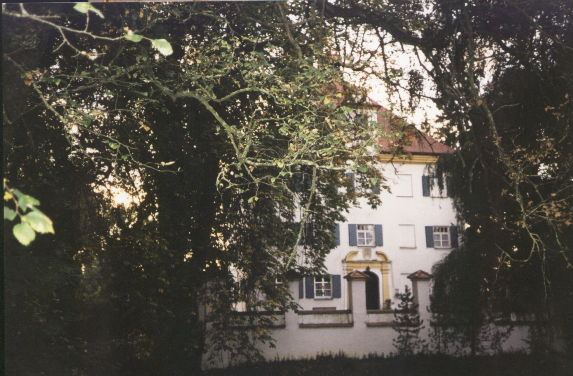 Schloss Kleinkötz, Landkreis Günzburg, Deutschland